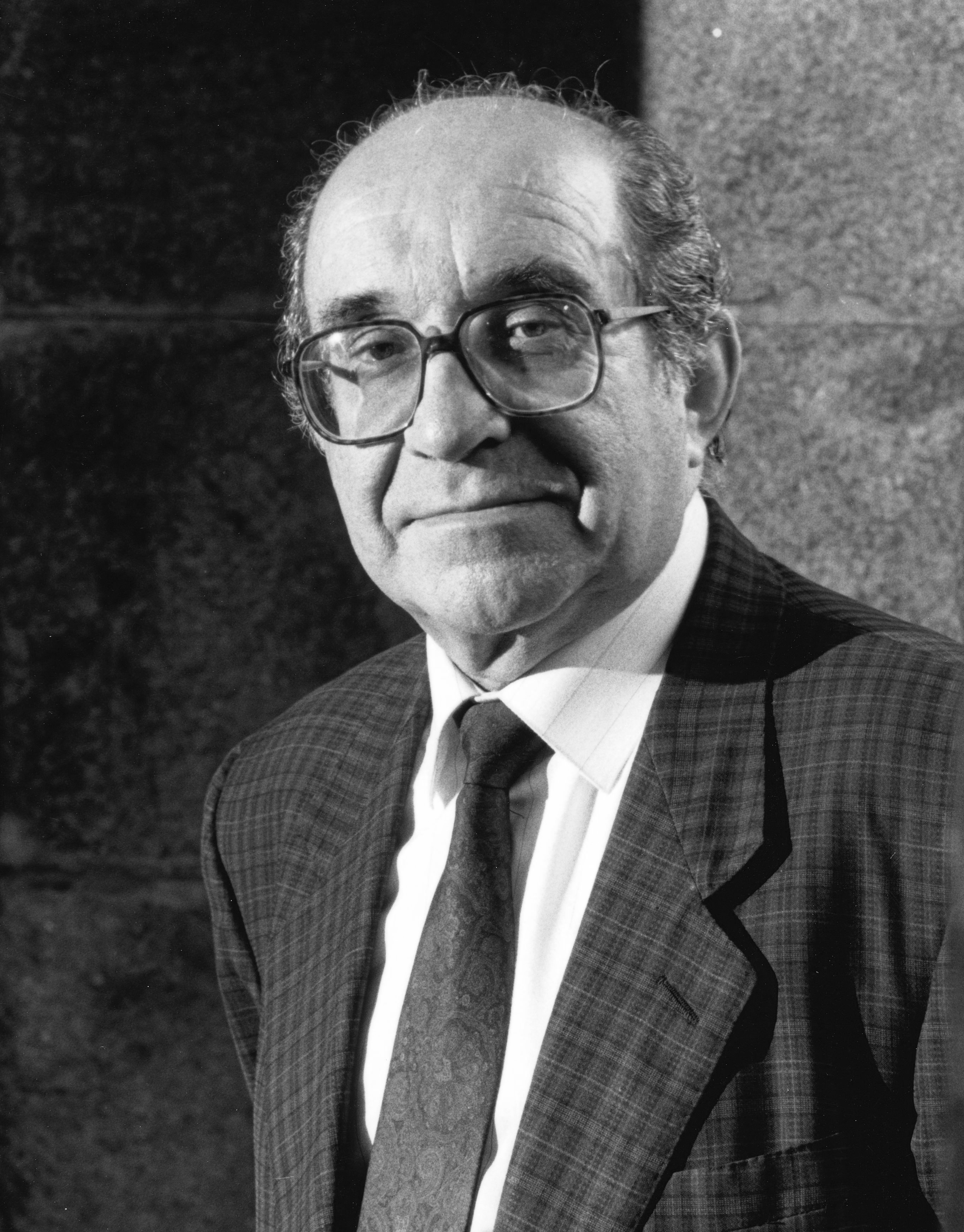 Retrato en blanco y negro de Luciano García Alén